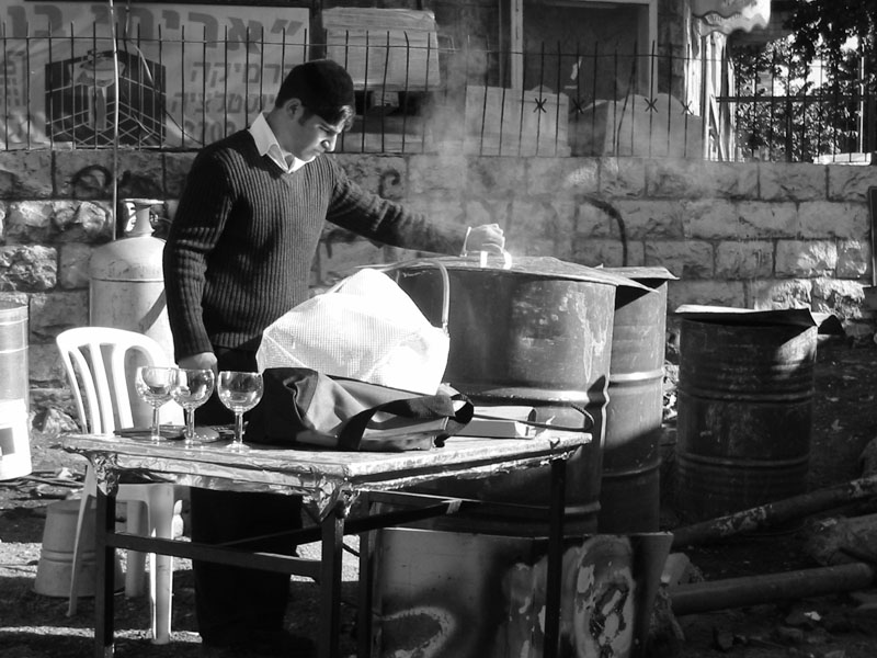 In Mea Sharim, Jerusalem, wird Geschirr abgekocht, um es kosher für Pessach zu machen